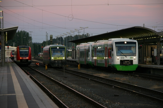 Hof_Hauptbahnhof_Gleis_2_bis_4